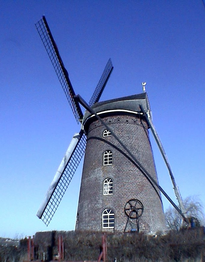 Moulin Saint Arnould (Steenmeulen) à Terdeghem, canton de Steenvoorde, Nord, France.